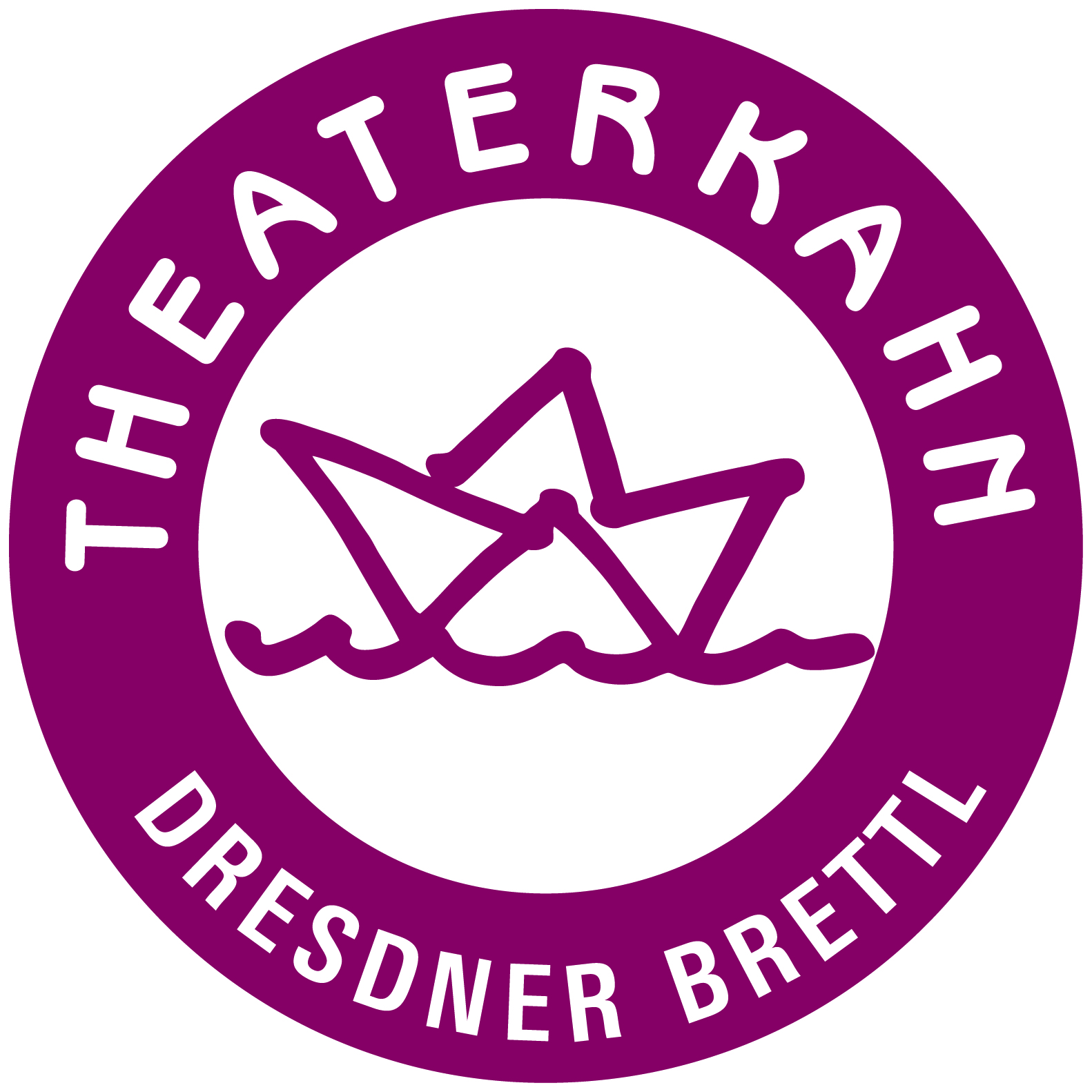 Logo des Theaterkahns